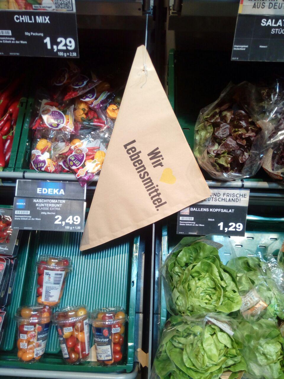 Obsttüte für loses Obst oder Gemüse